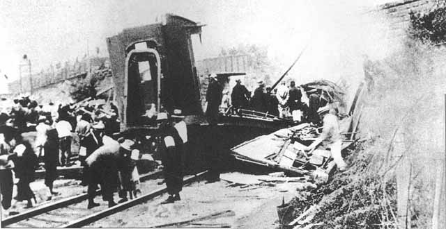 張作霖爆殺事件、張作霖が乗車していた列車の残骸